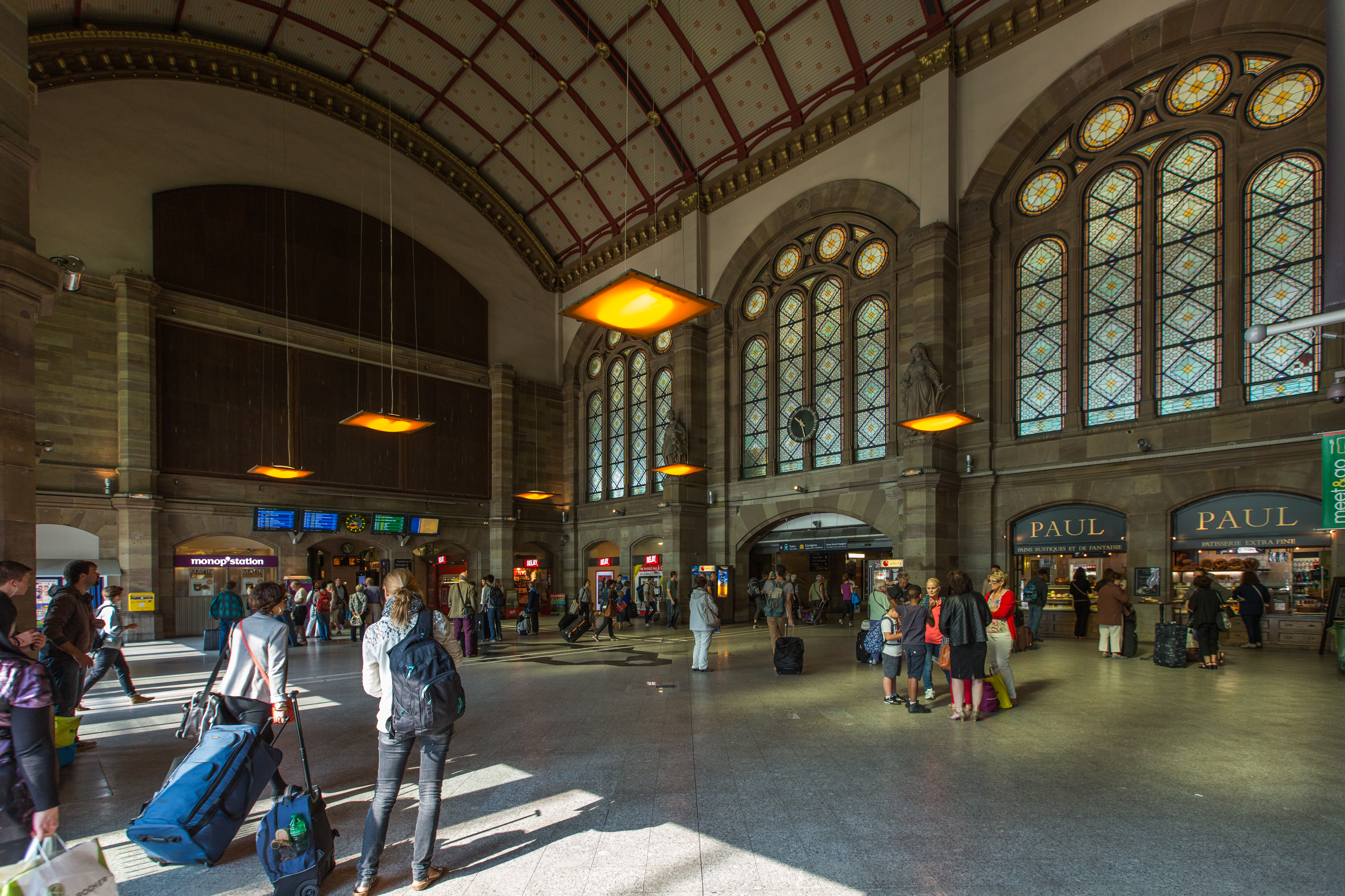 Strasbourg gare centrale le hall des départs en août 2013 .